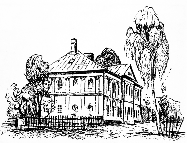 Rycina starego zamku przed zburzeniem